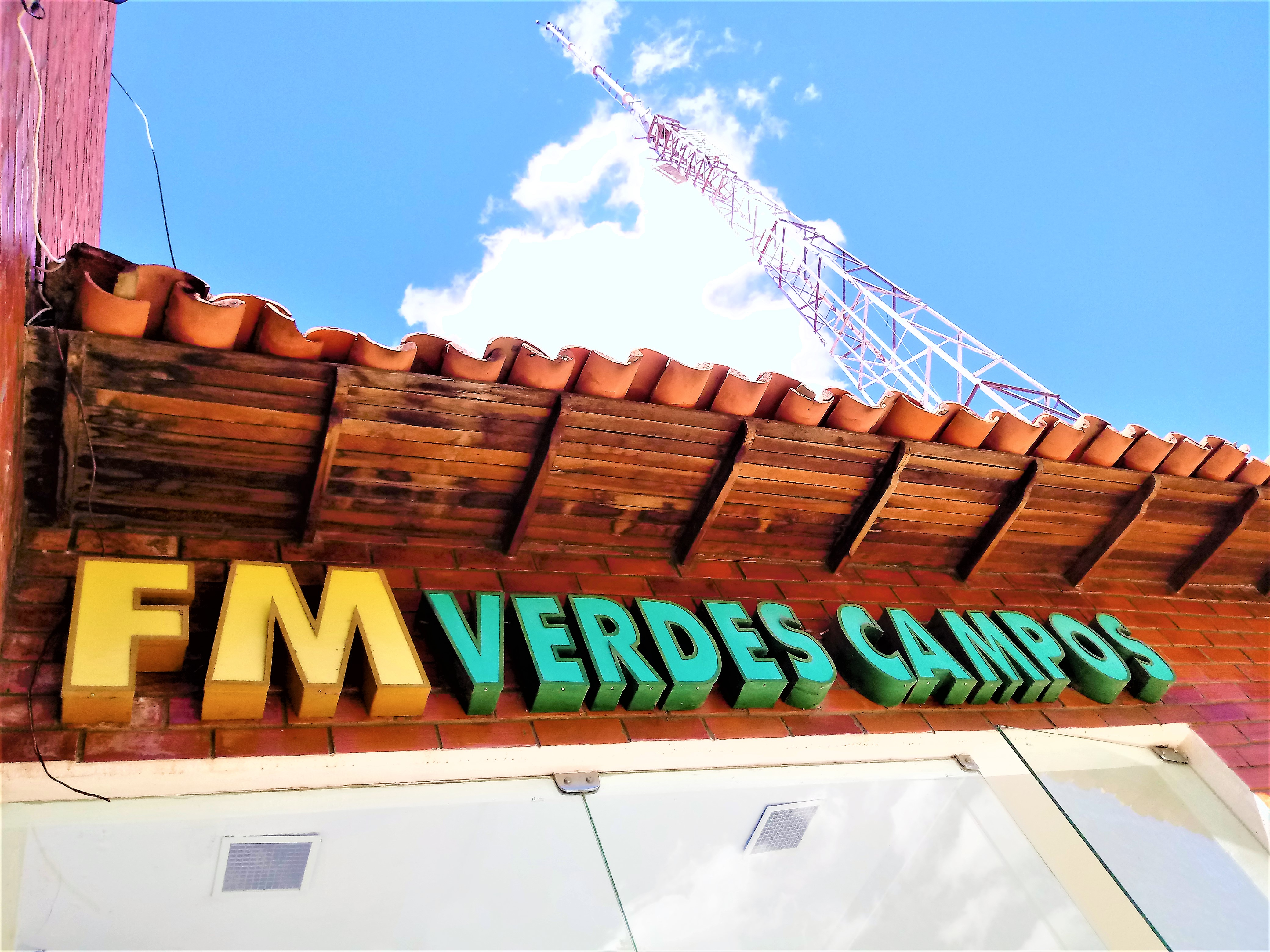 Placa letral da Verdes Campos FM, da Rede Verdes Campos